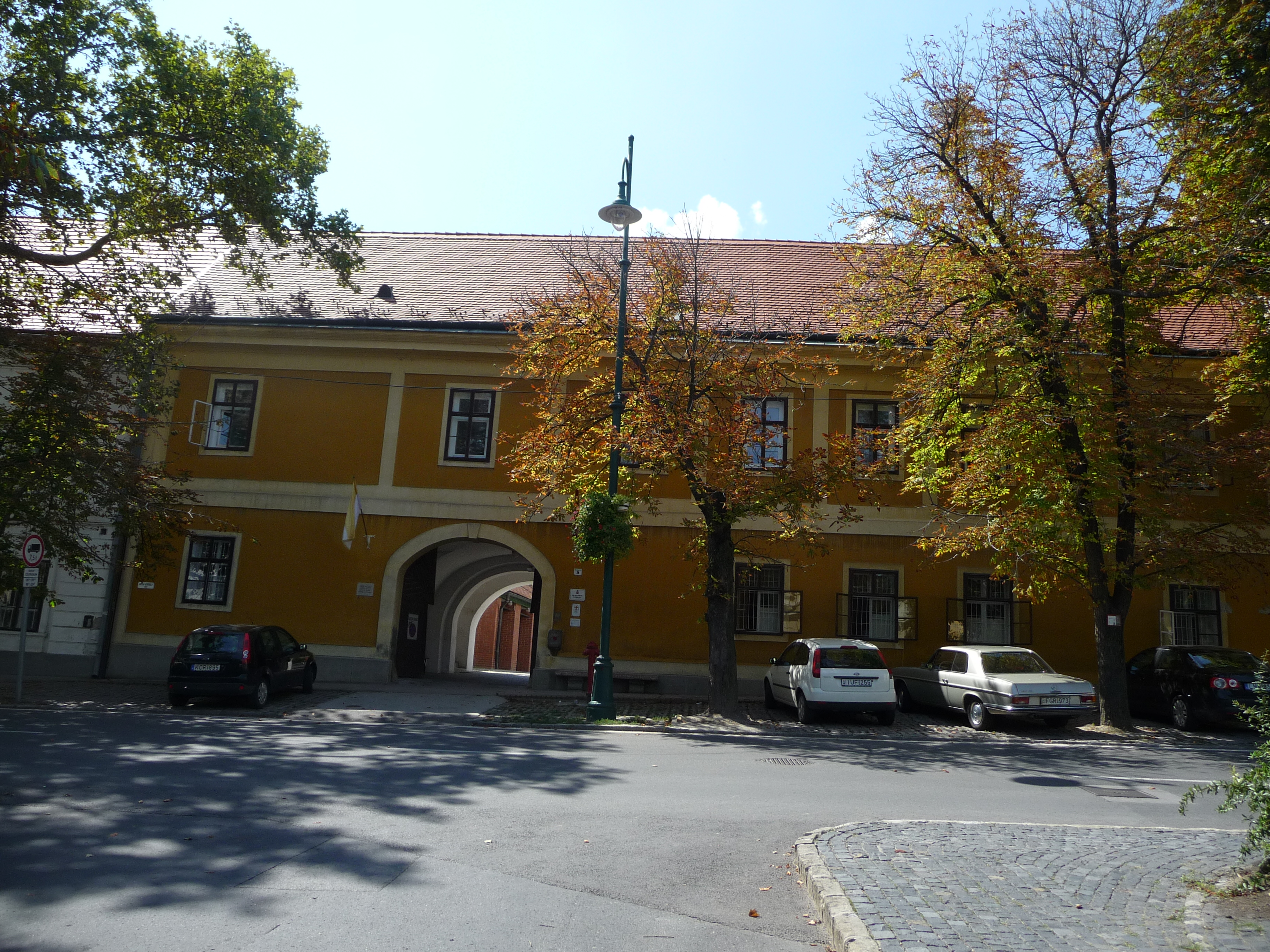 A belvárosi plébánia Szekszárdon